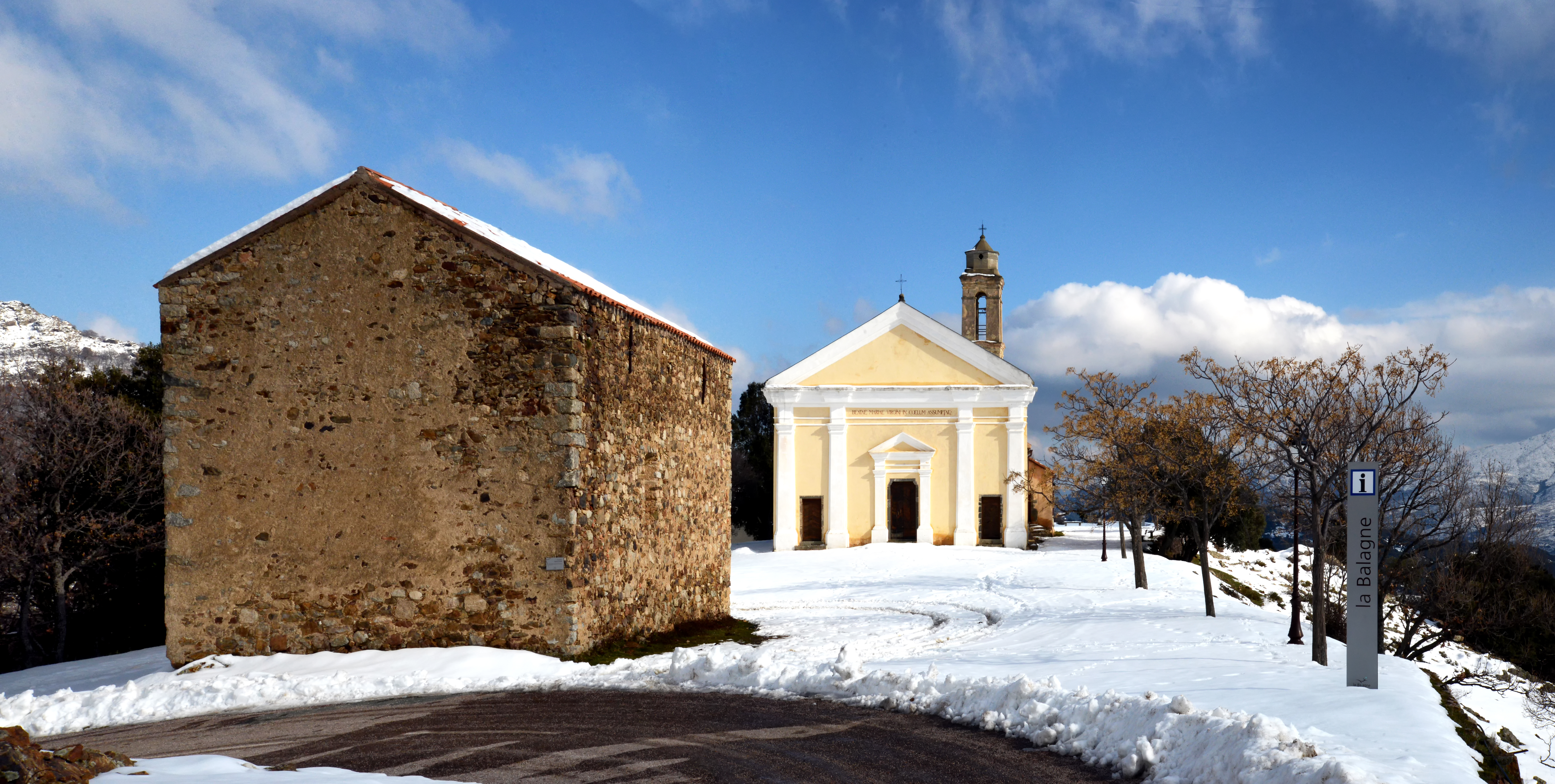 Pioggiola, Giussani (Haute-Corse) - L'oratoire de la confrérie San Parteu (a casazza) à gauche, et l'église paroissiale Santa Maria Assunta du XVIIe siècle